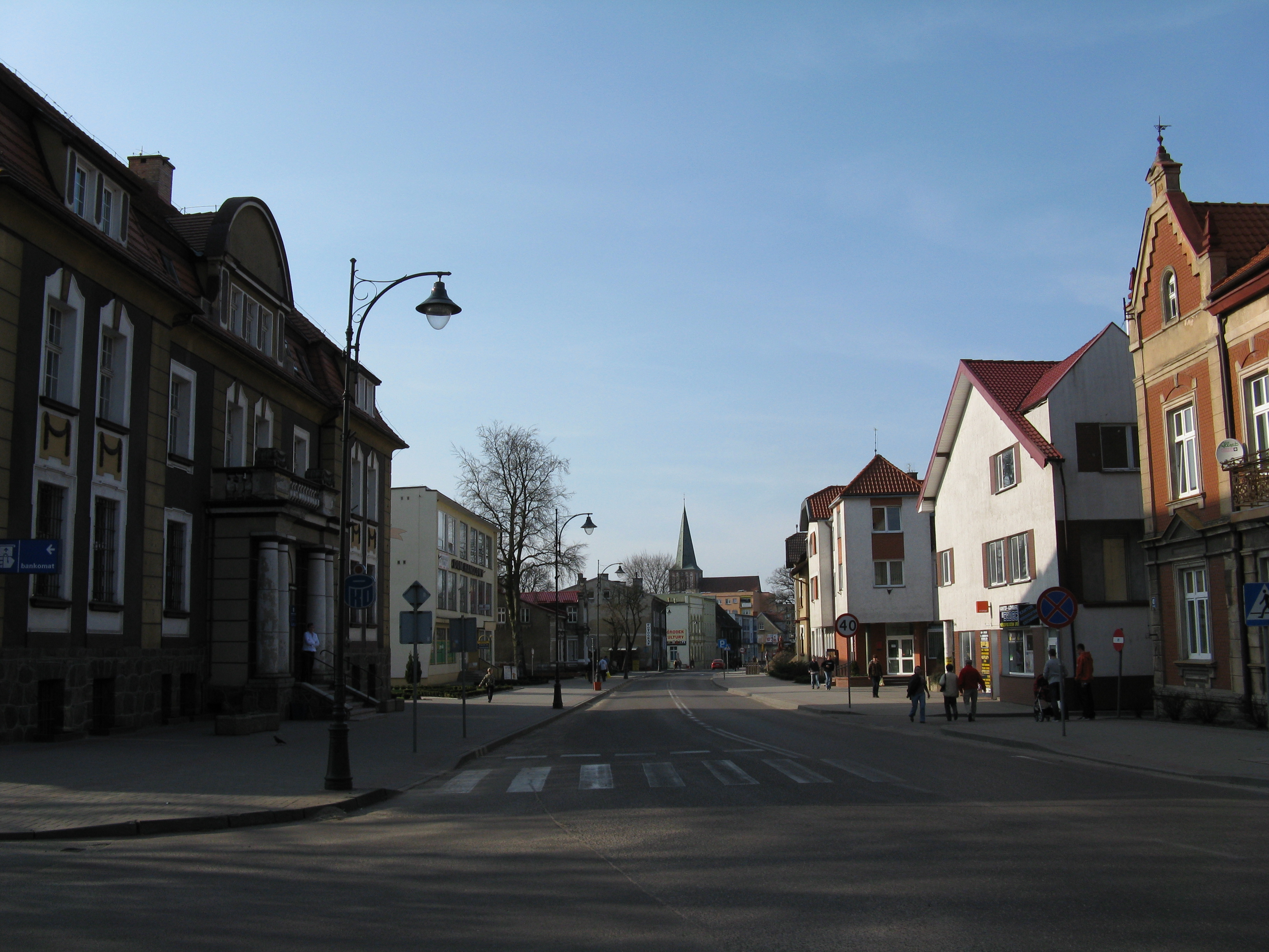 Ulica Józefa Piłsudskiego, Drawsko Pomorskie.